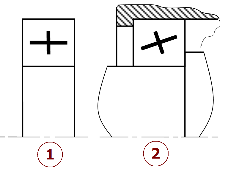 Représentation simplifiée d'un roulement à billes. (1) roulement à billes à contacts droits, seul. (2) roulement à billes à contacts obliques, assemblé. Illustration réalisée sous word.